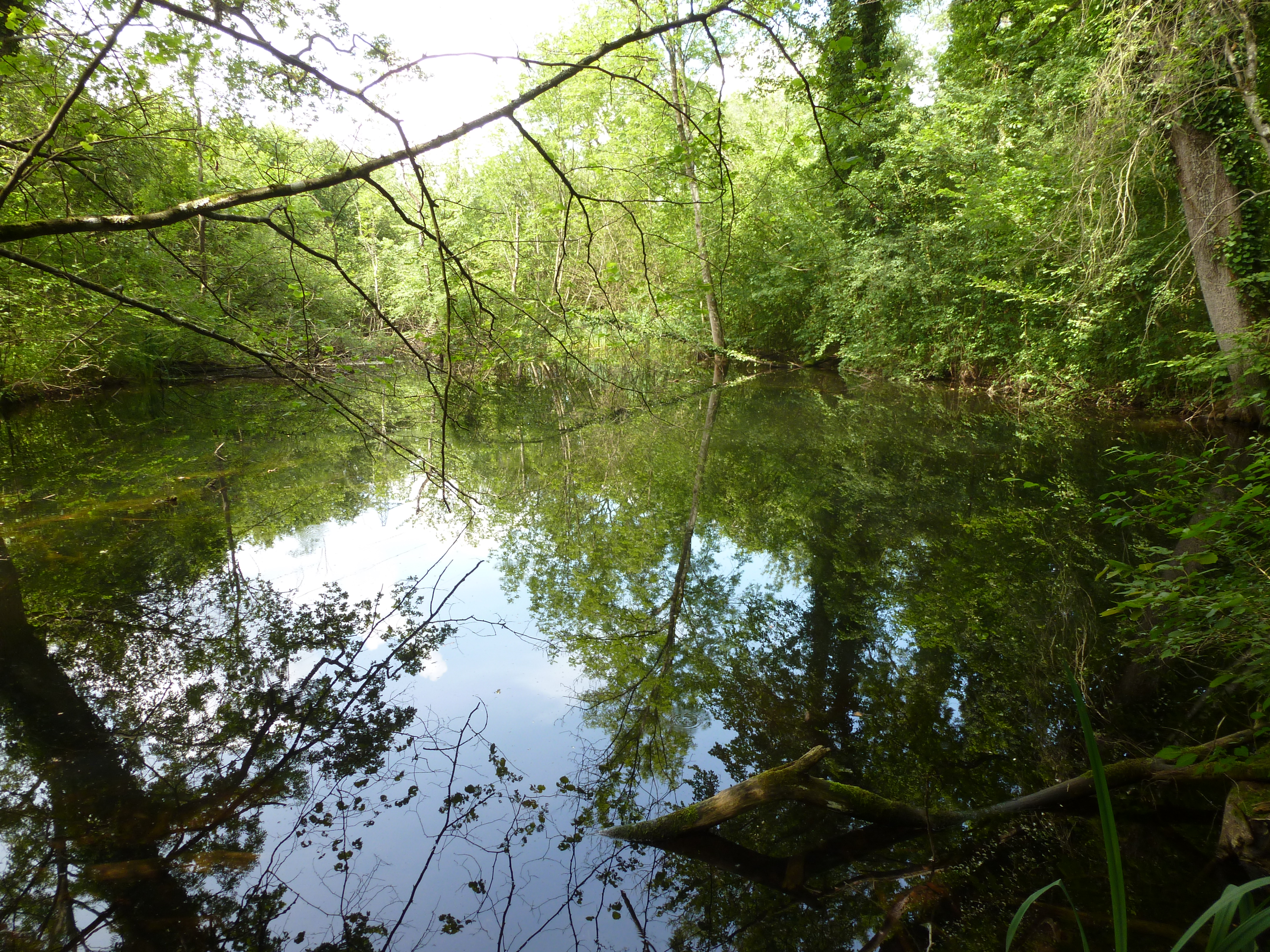 Réserve naturelle de l’île du Rohrschollen à Strasbourg.